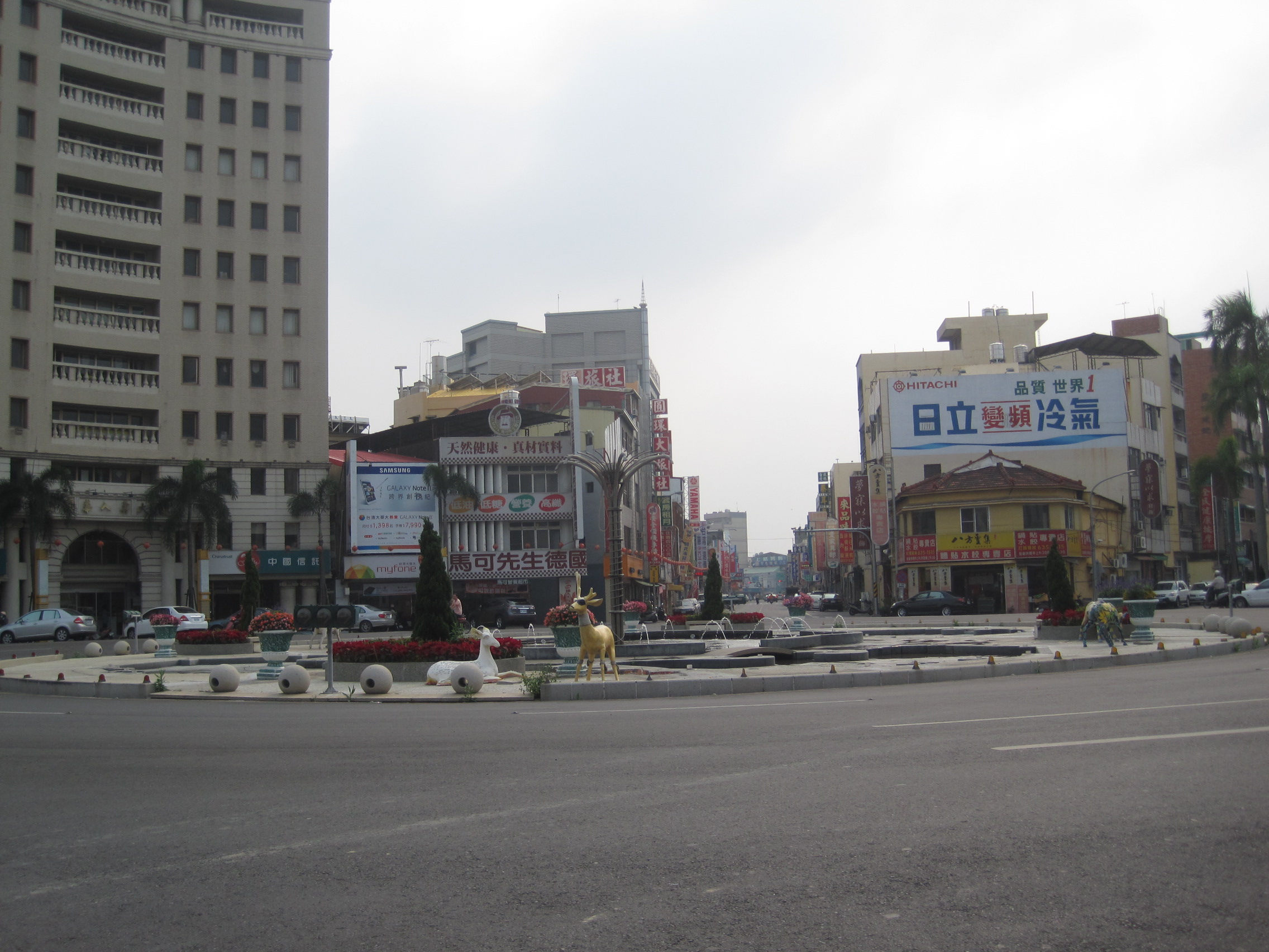 臺南新營圓環